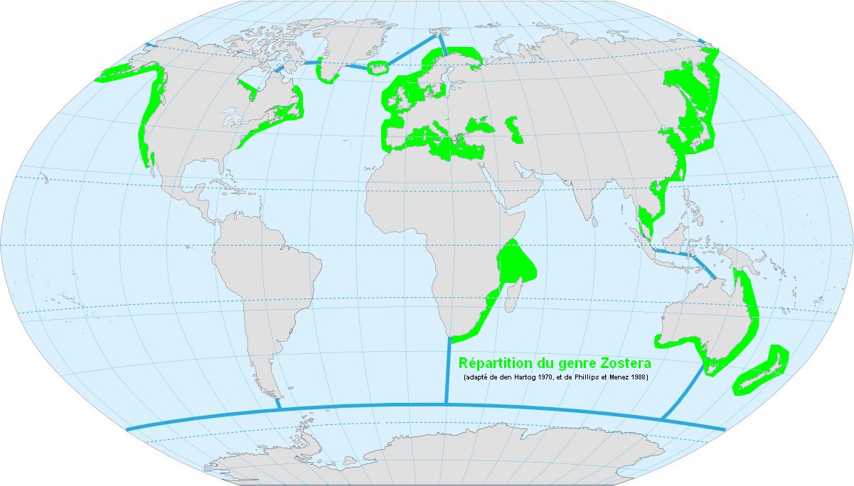 Répartition mondiale du genre Zostera (adapté de den Hartog 1970, et de Phillips et Menez 1988)